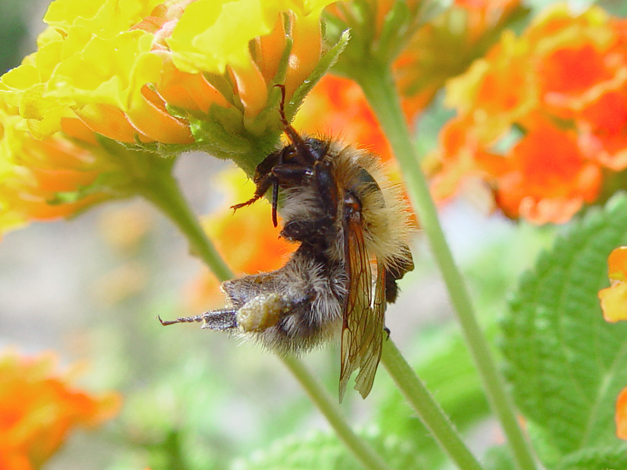 Beschreibung: mumifizierte Biene Aufnahmedatum: Fotografiert am 16. August 2003 Fotograf: ArtMechanic